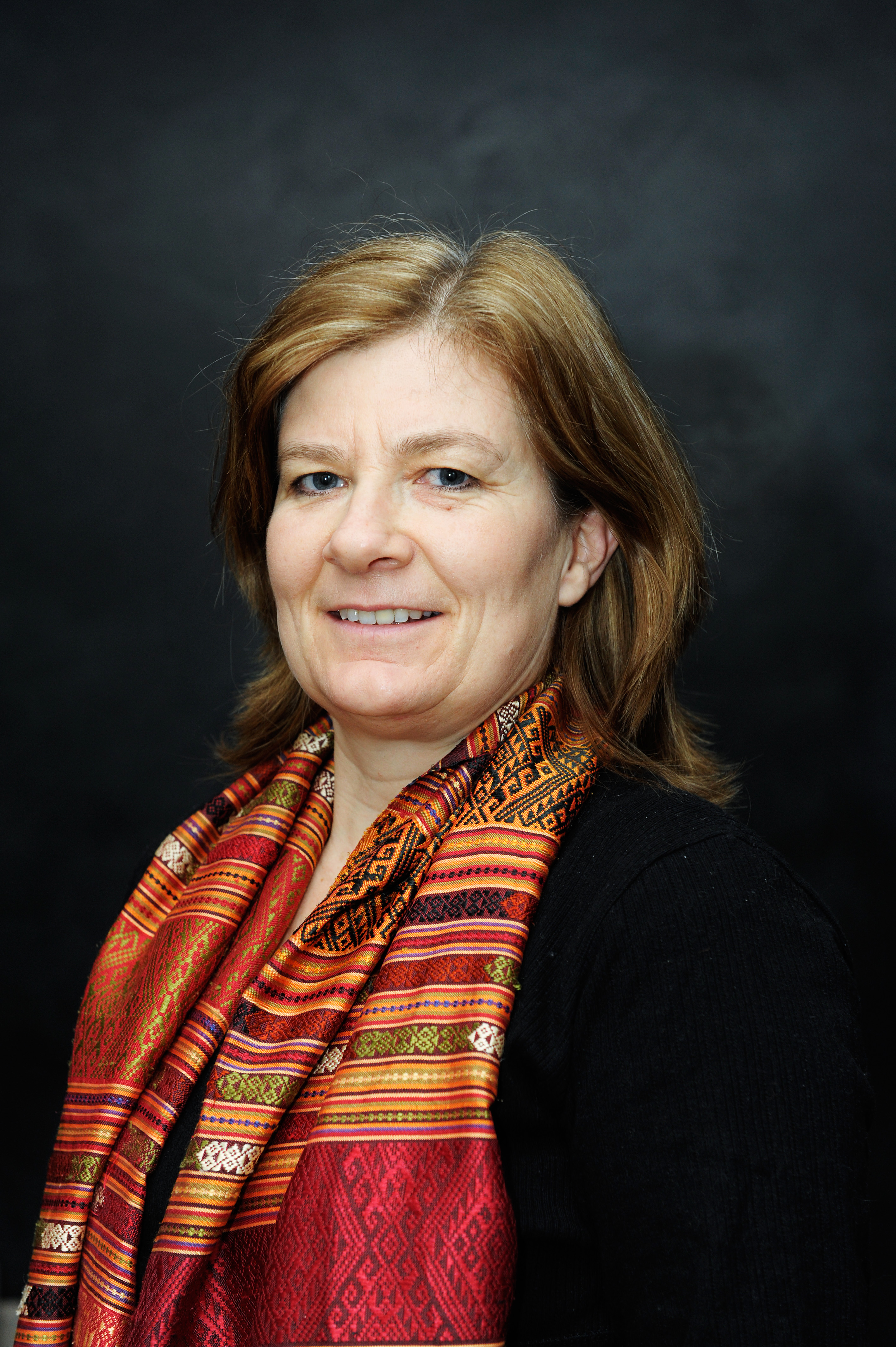 Hanne Agersnap (SF) Danmark 2009-01-28